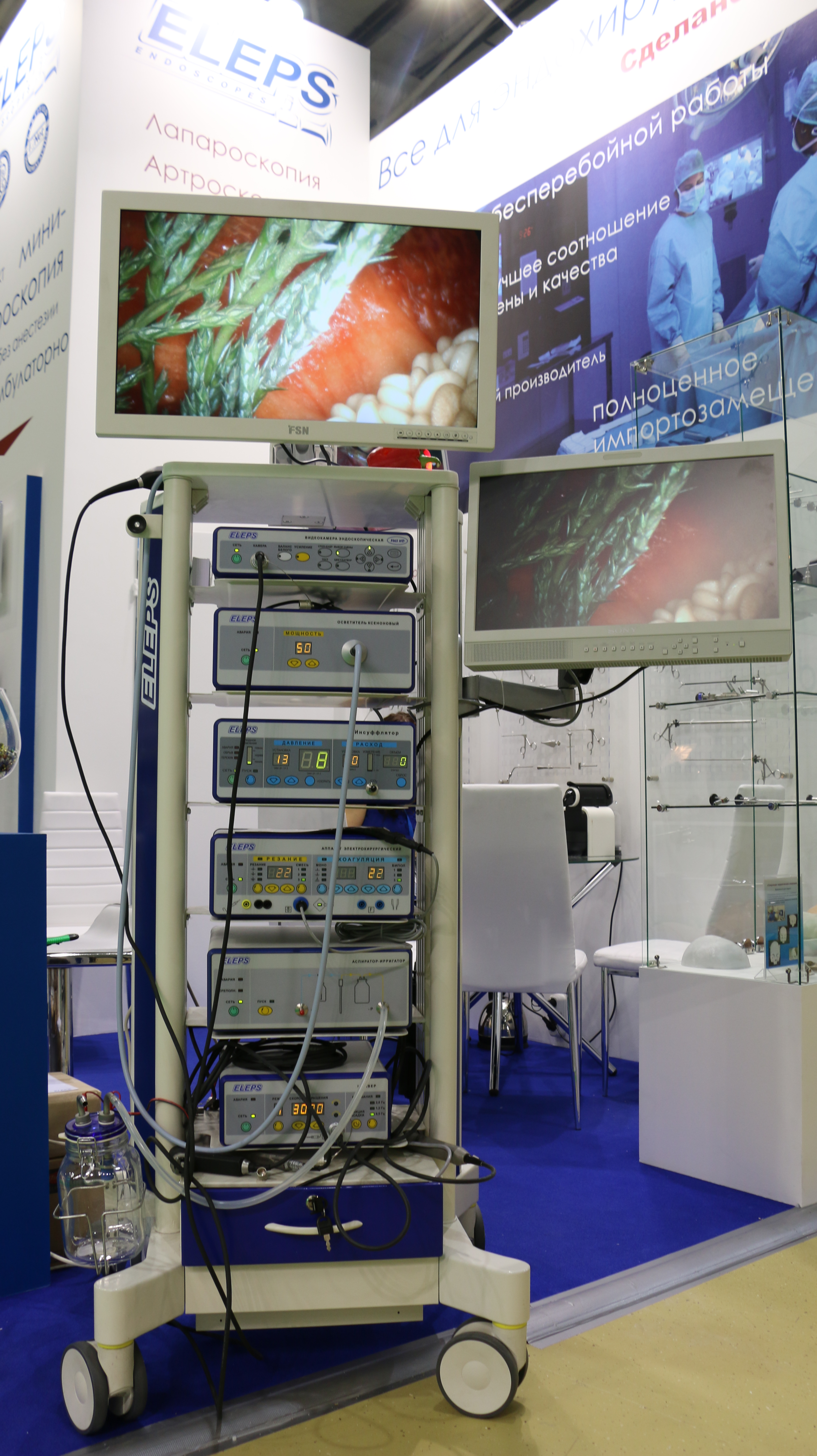 Базовый лапароскопический комплекс "ЭлеПС" на международной выставке "Здравоохранение 2015"